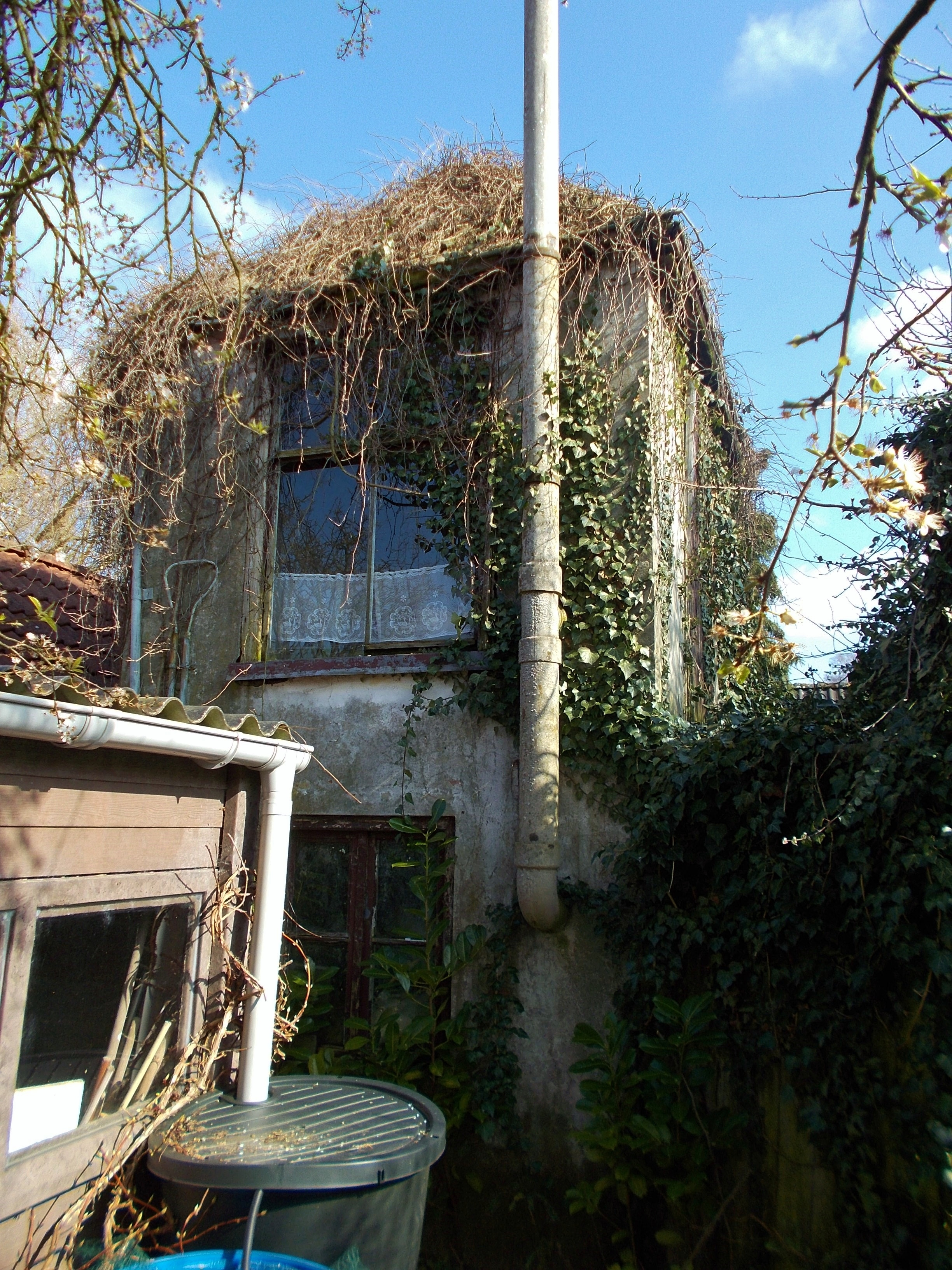 Negentiende-eeuws tuinhuis met verdieping achter Rozenstraat 44, Deventer. Gemeentelijk monument.